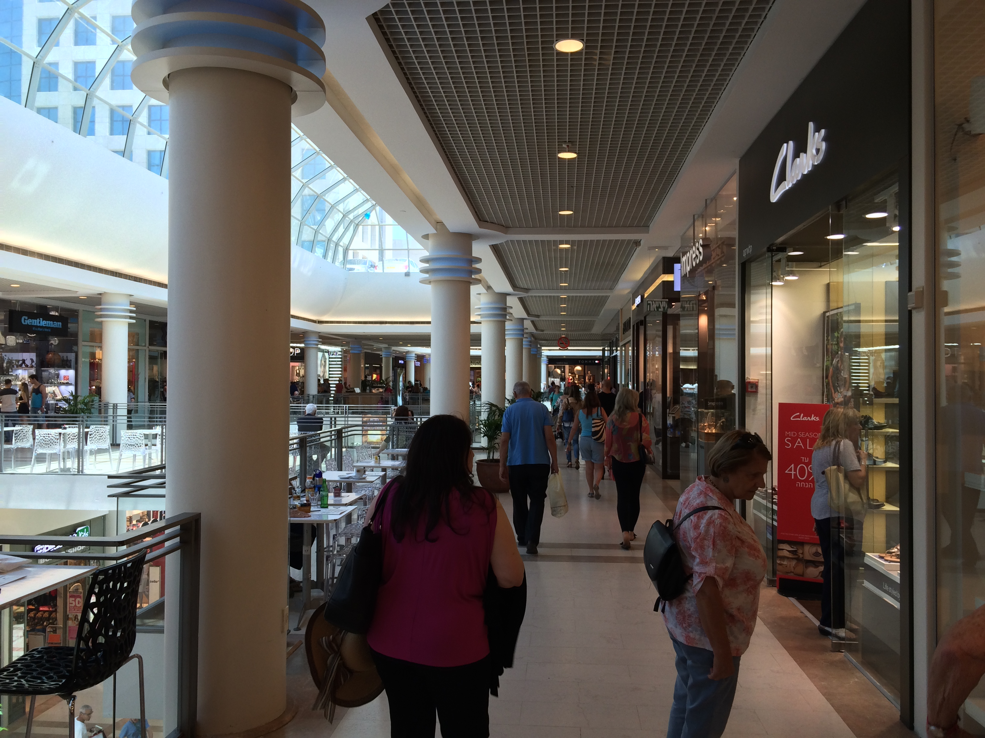 Ramat Aviv Mall - Tel Aviv, Israel